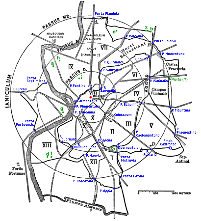 Overgenomen van Lucius Curtius: Art. Pomerium, in Samuel Ball Platner (completed and revised by Thomas Ashby), A Topographical Dictionary of Ancient Rome, Londen, 1929, pp. 392 ‑ 396.